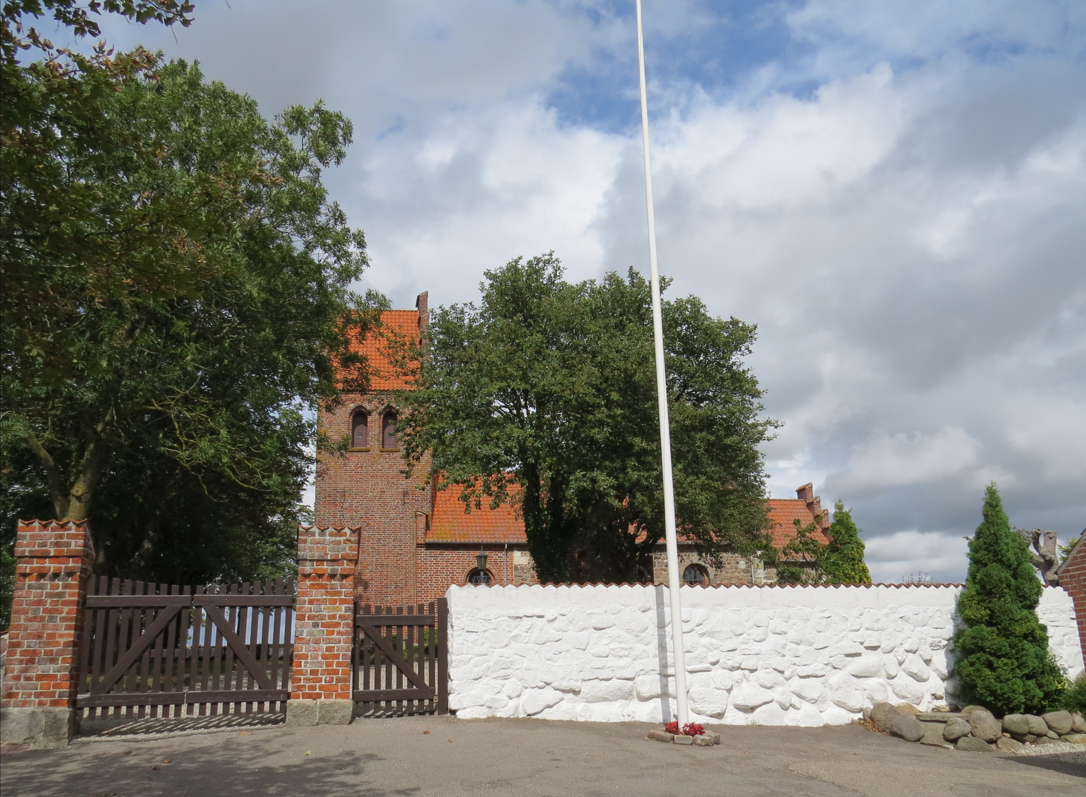 Indgang og kirkegårdsmur ved Snostrup Kirke, Sjælland